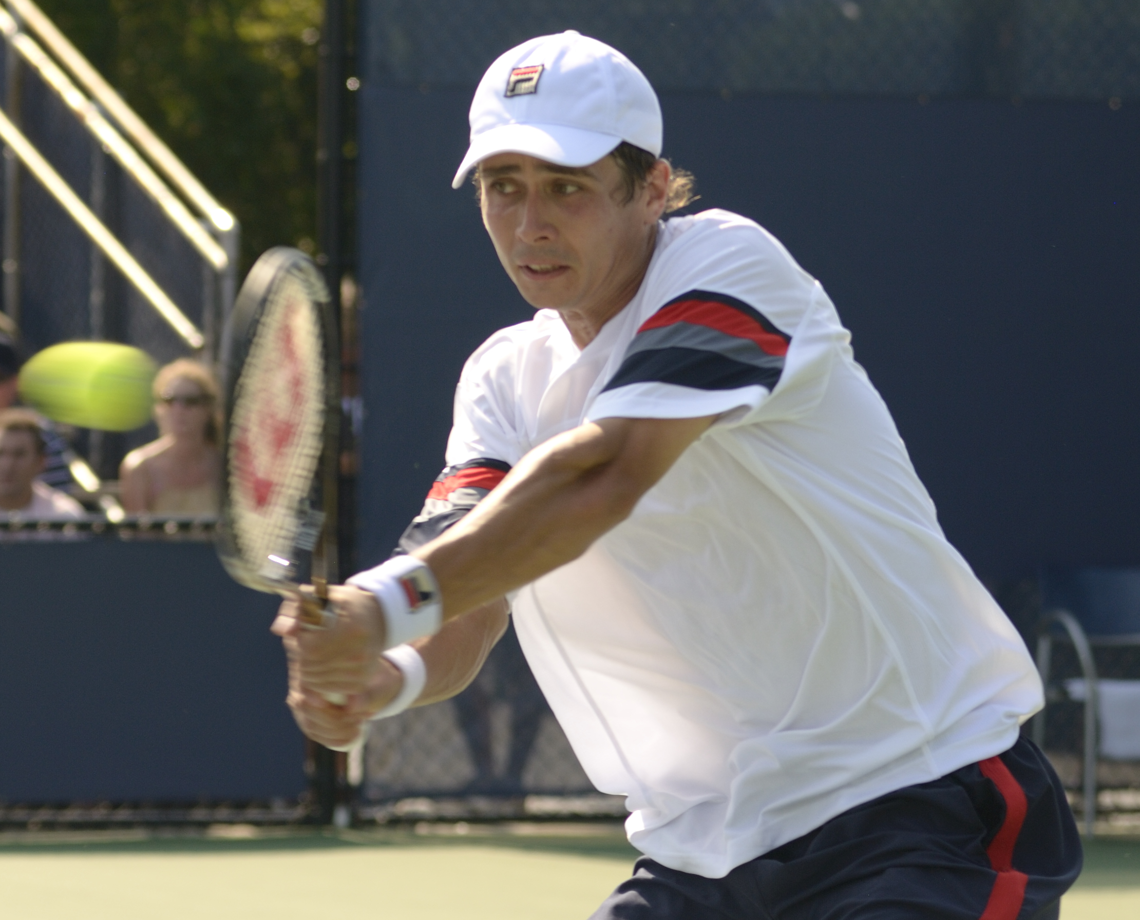 Igor Kunitsyn